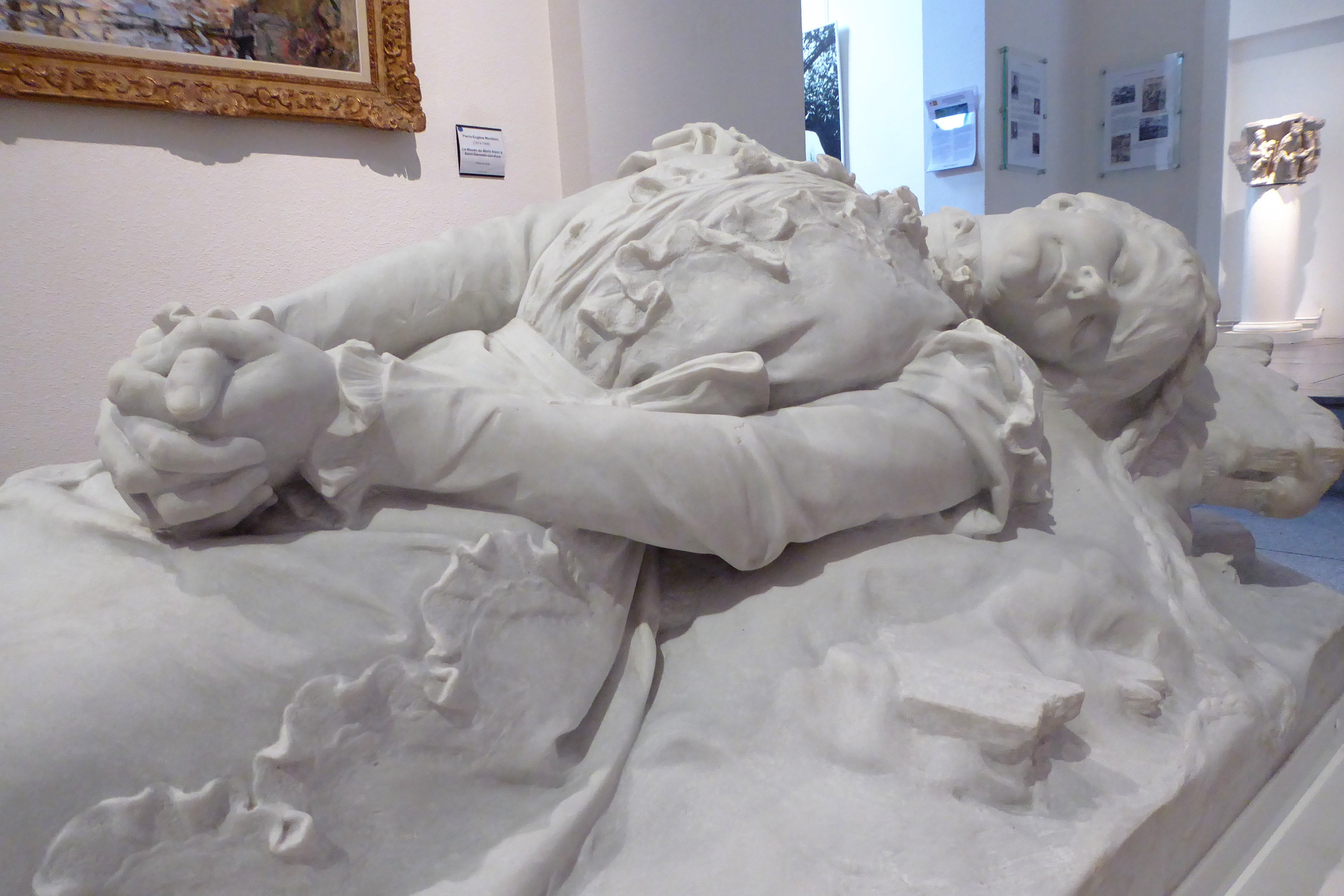 gisant de Sophie-Charlotte-en-Bavière, duchesse d'Alençon, par Barrias, musée de Dreux, Eure-et-Loir, France.